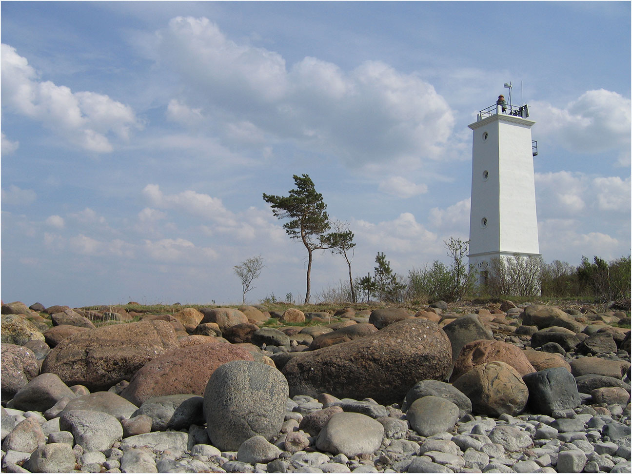 Letipea tuletorn